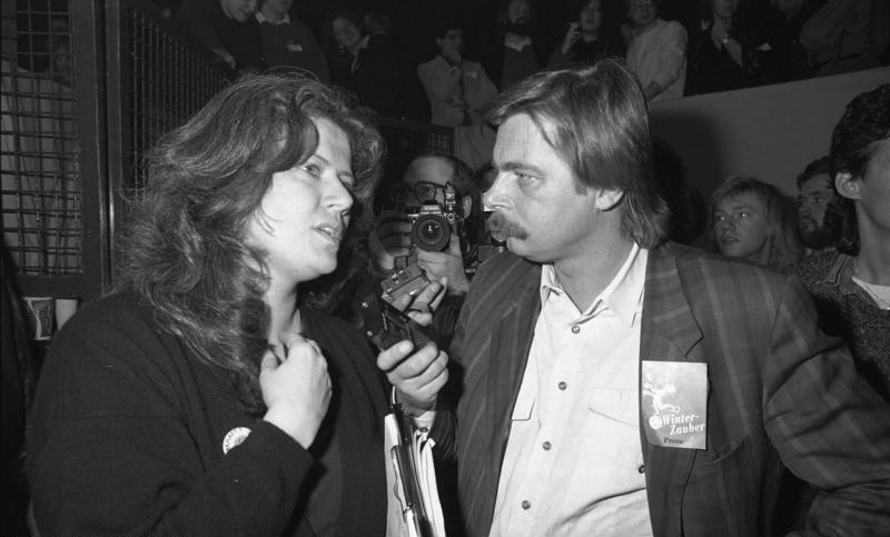 25.1.1987 Bundestagswahl: Wahlparty der Partei "Die Grünen" in der Biskuithalle, Bonn Interviews mit Otto Schily und Jutta Ditfurth.